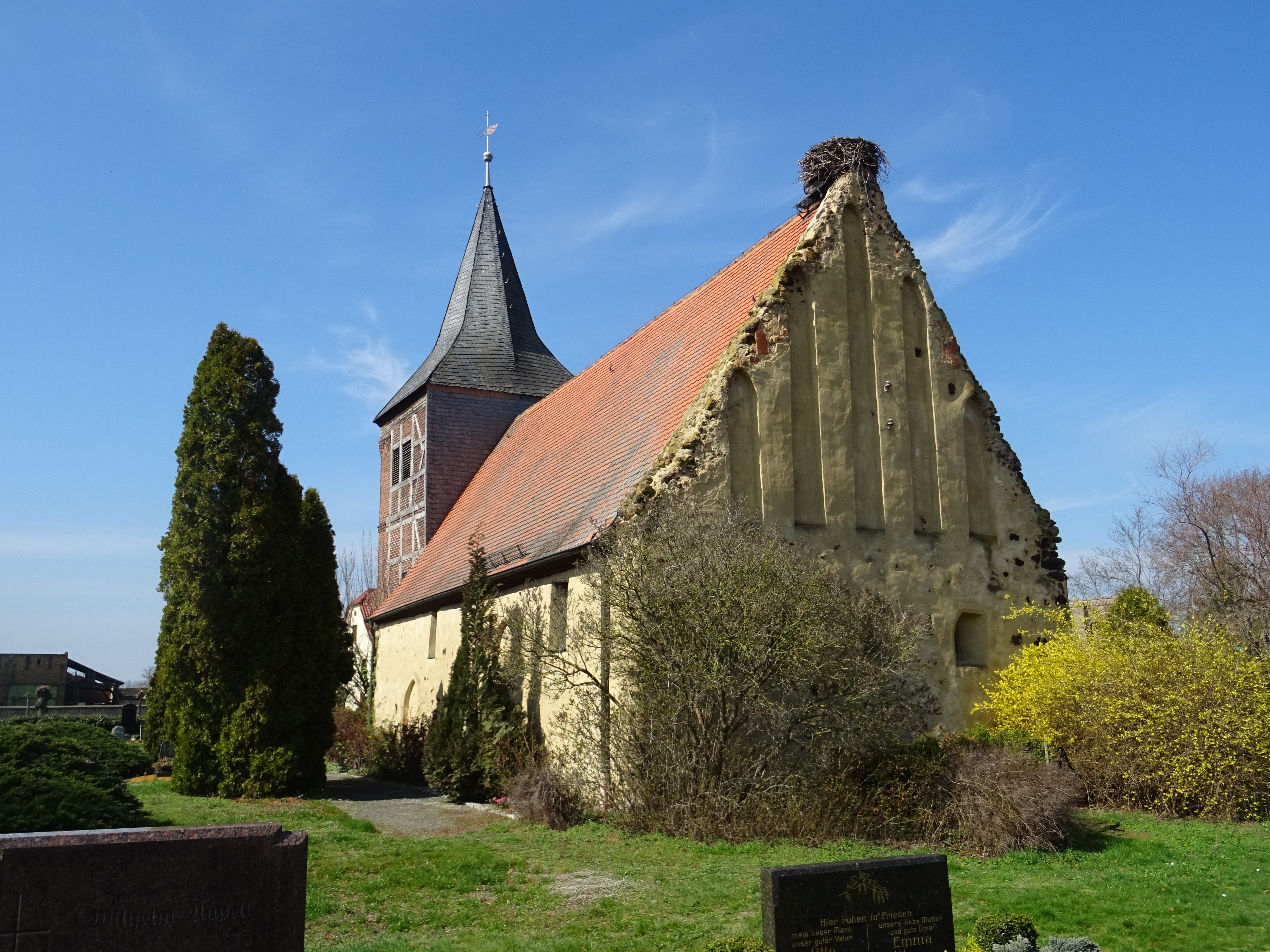 Lammsdorf, Ortsteil von Kemberg, Dorfkirche, Blick von Südosten